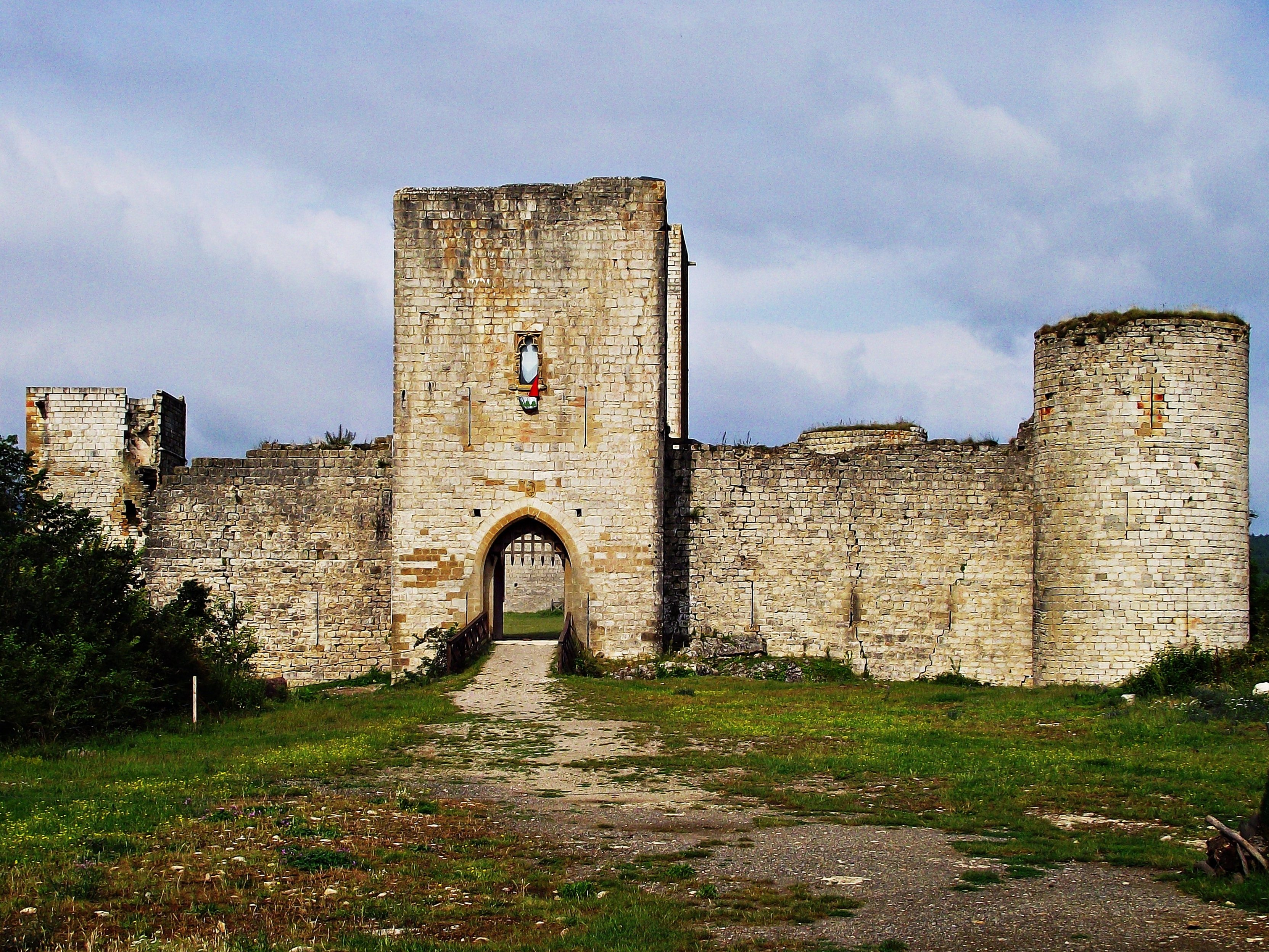 Entrée du château de Puivert (Aude, France) .